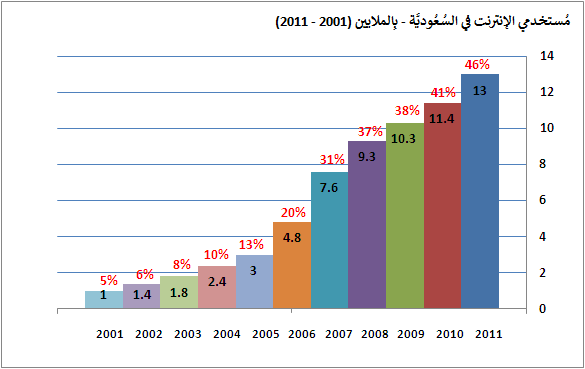 رسمٌ بياني يُظهر نُمُو أعداد مُستخدمي الإنترنت في السُعُوديَّة.